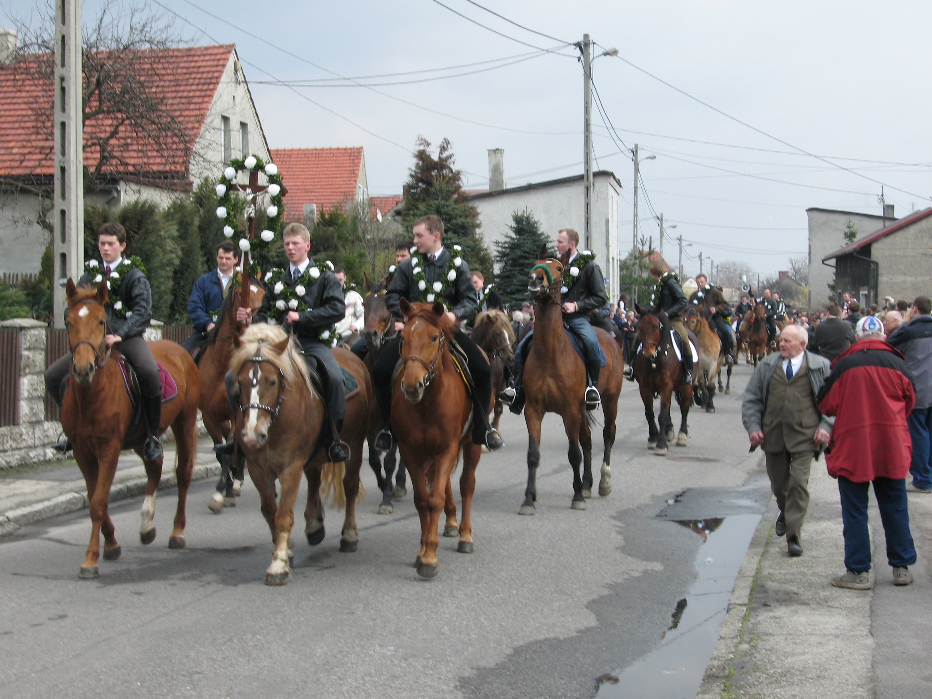 Procesja konna w Ostropie (dzielnica Gliwic) z okazji Poniedziałku Wielkanocnego